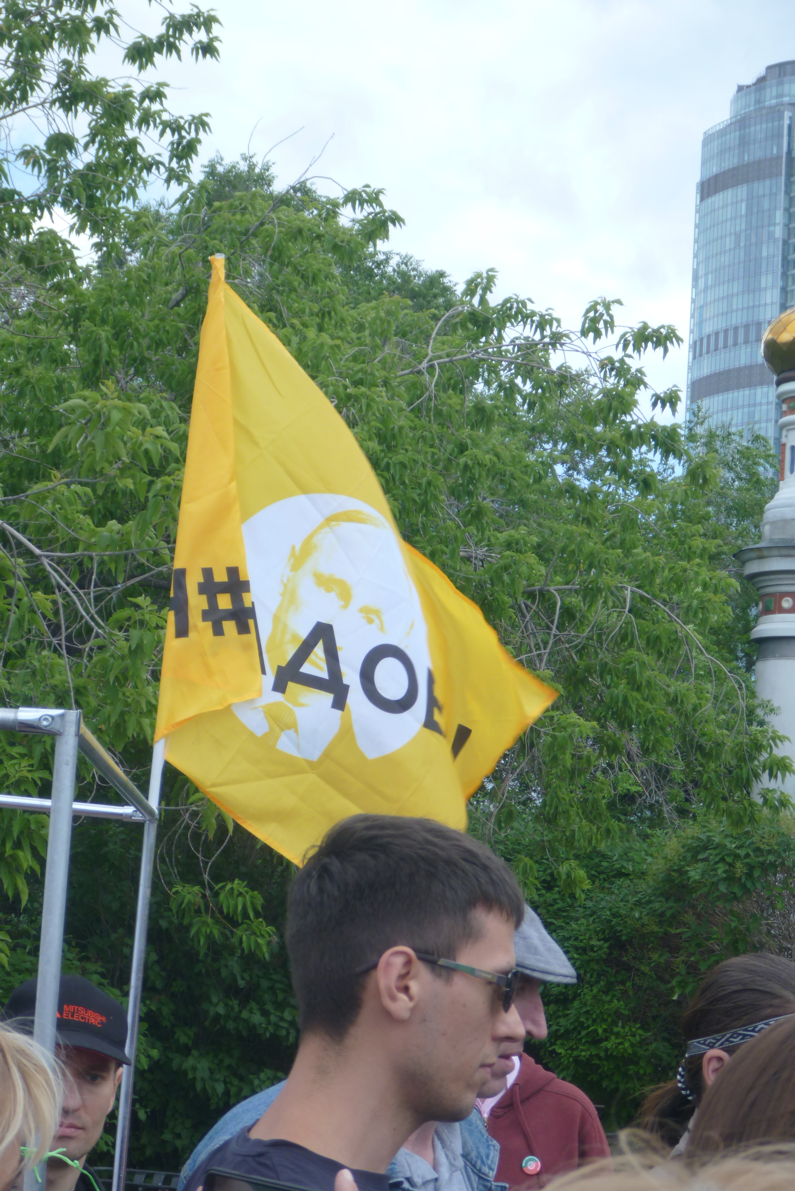 Флаг Надоел на пикете в Екатеринбурге 6 июля 2019 года